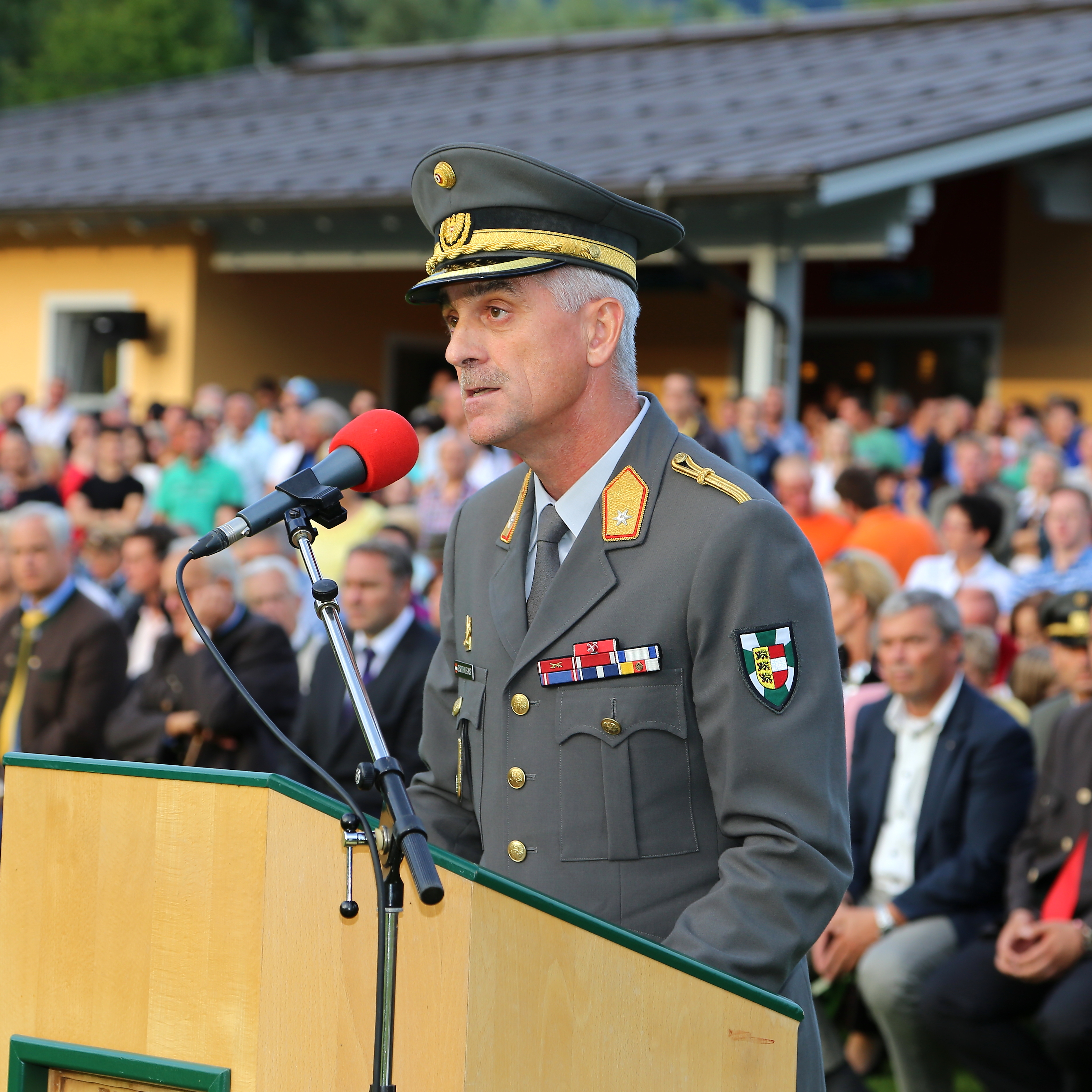 Gitschtaler